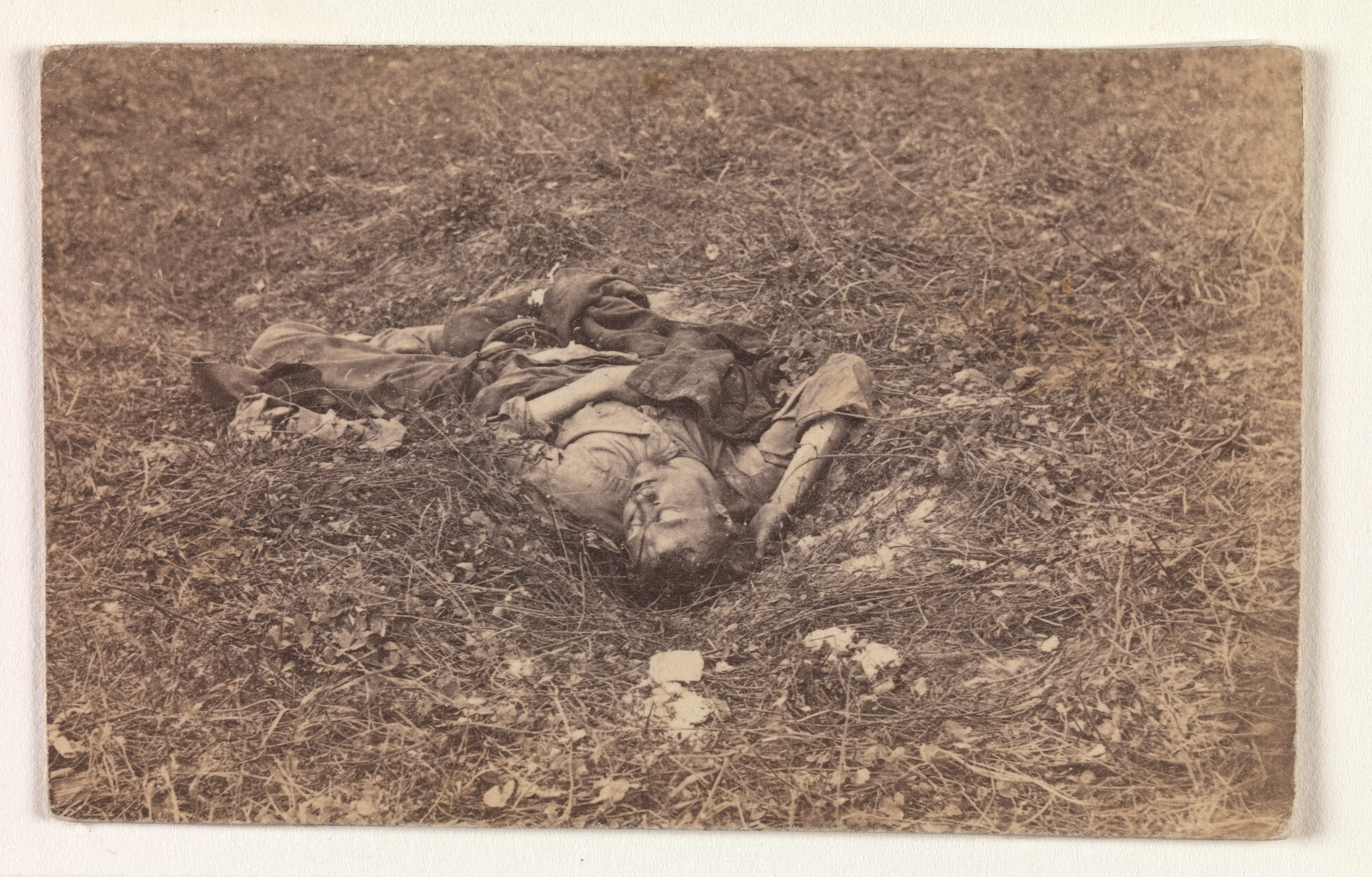 Carte-de-visite; Photographs